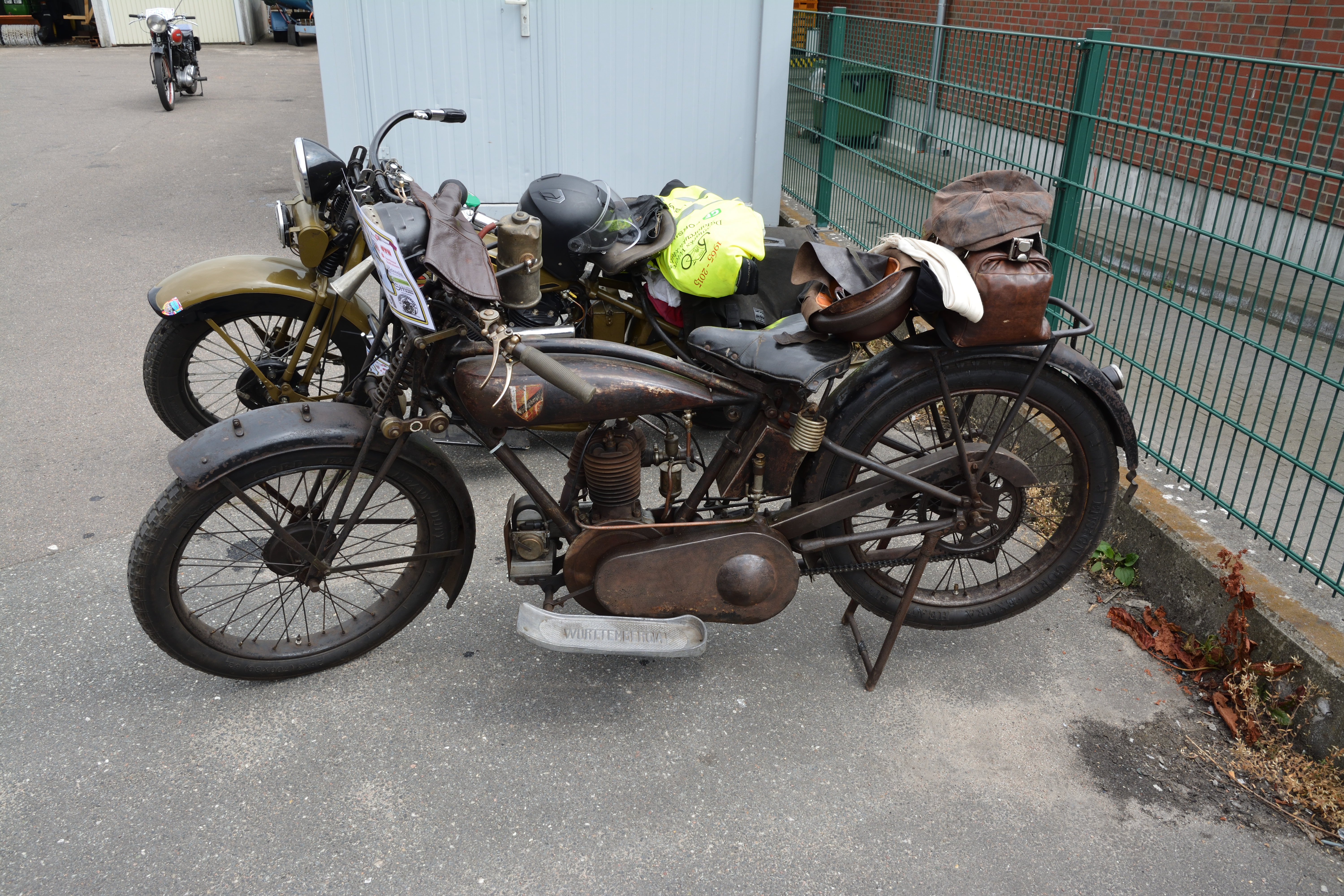 Impressionen der "Zehnten Internationalen VFV ADAC Zwei-Tage-Motorrad-Veteranen-Fahrt-Norddeutschland" und der "33ten Int-Windmill-Rally" 2018 in Wilster. Teilnehmer- und Modelliste Leider standen die Maschinen am Breakpoint entweder extrem dicht oder die Teilnehmer fuhren schnell wieder ab. Alle Maschinen mussten vor 1945 gebaut sein.